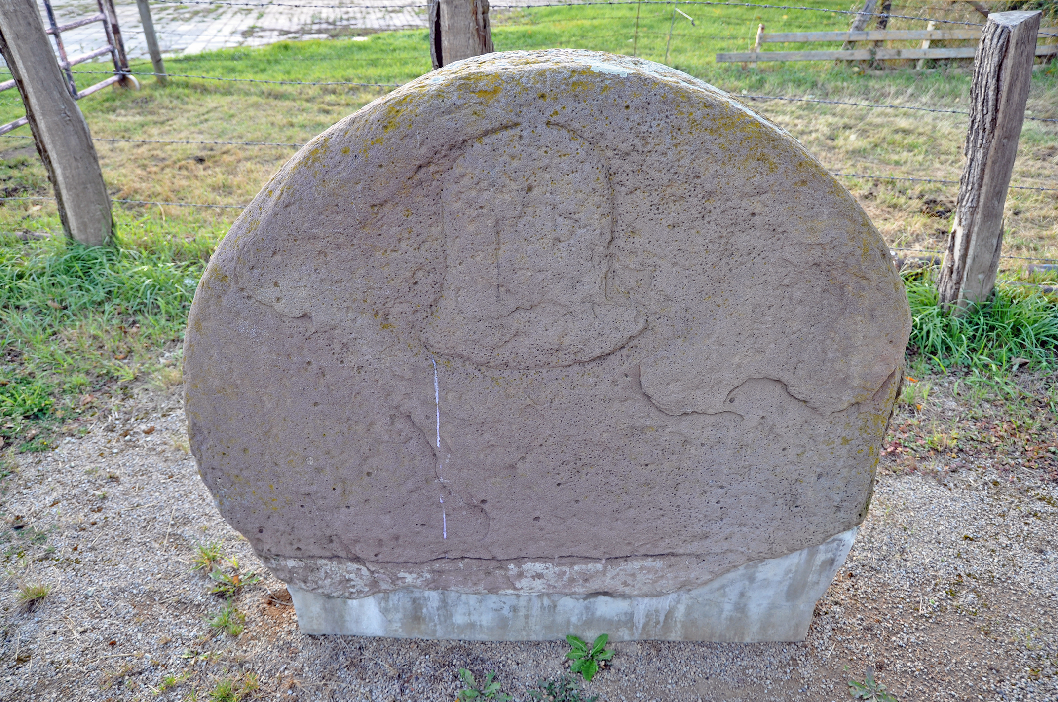 Glockenstein in Bremen, Am GlockensteinDas abgebildete Objekt ist ein geschütztes Kulturdenkmal in der Freien Hansestadt Bremen, mit der Nr. 0483 beim Landesamt für Denkmalpflege registriert.